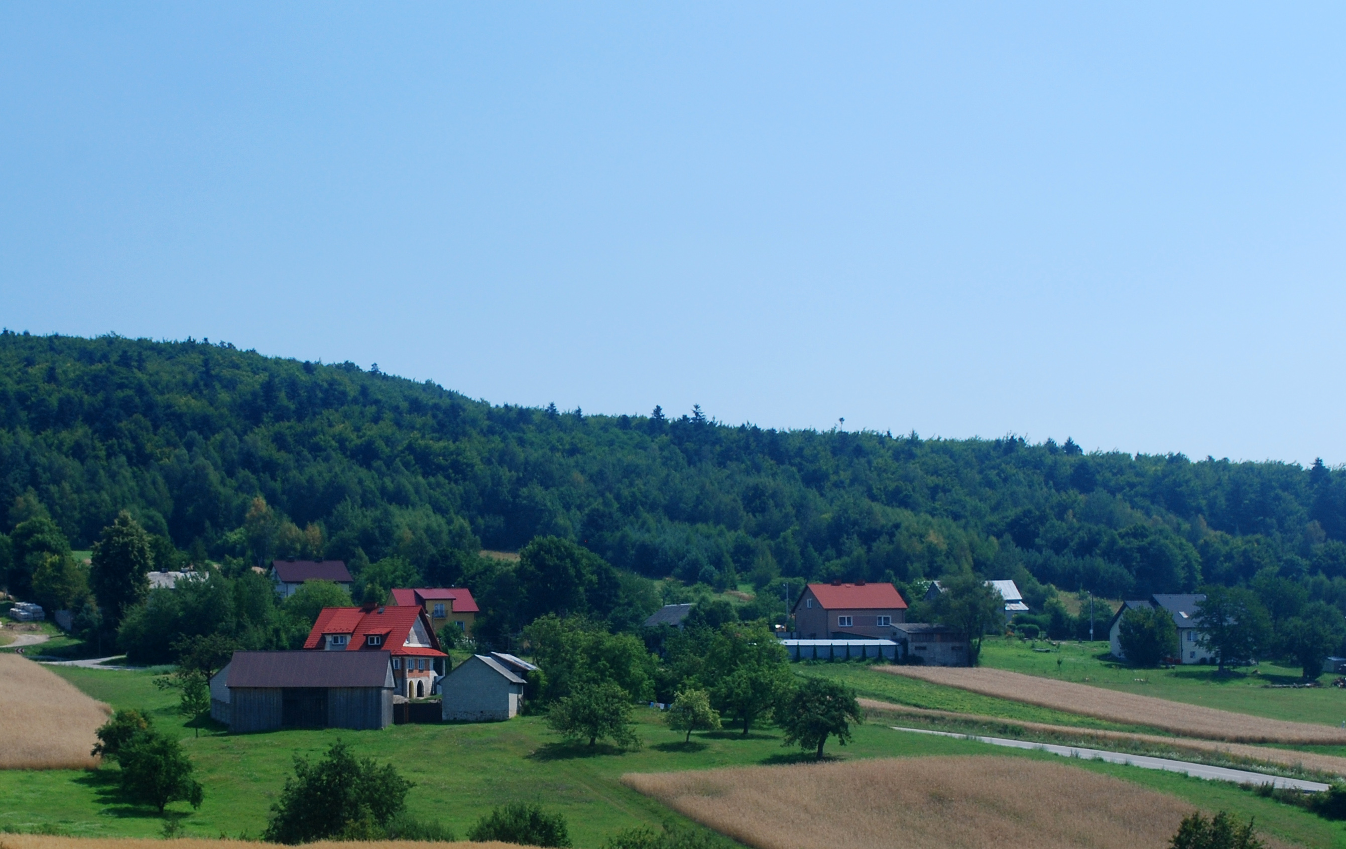 Huta Stara - a village in Góry Świętokrzyskie